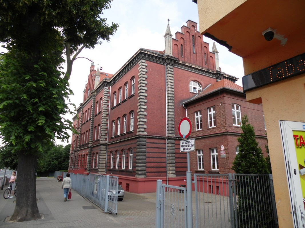 Zabytkowa kamienica. Obecnie szkoła.